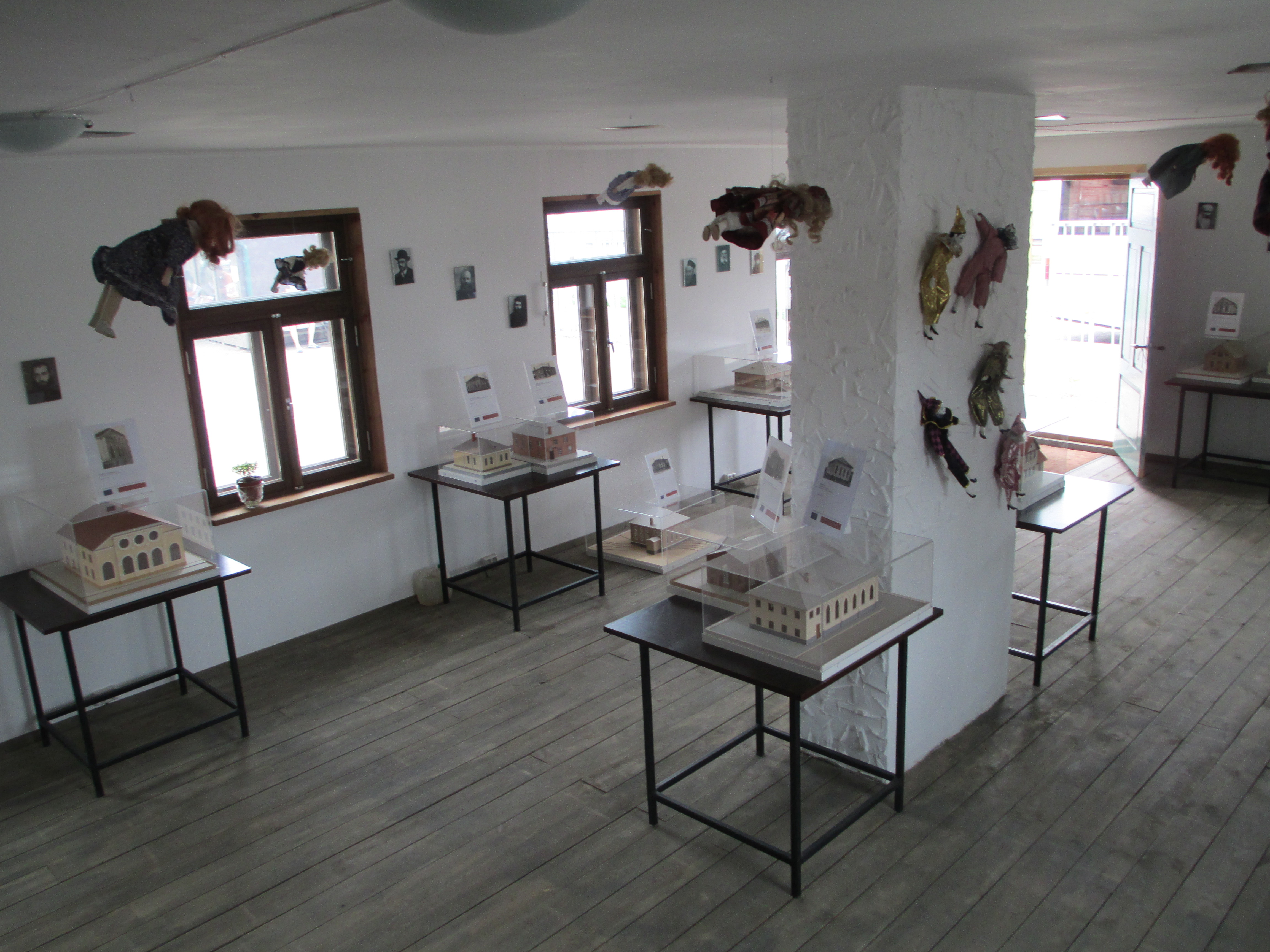 מוזיאון גטו ריגה